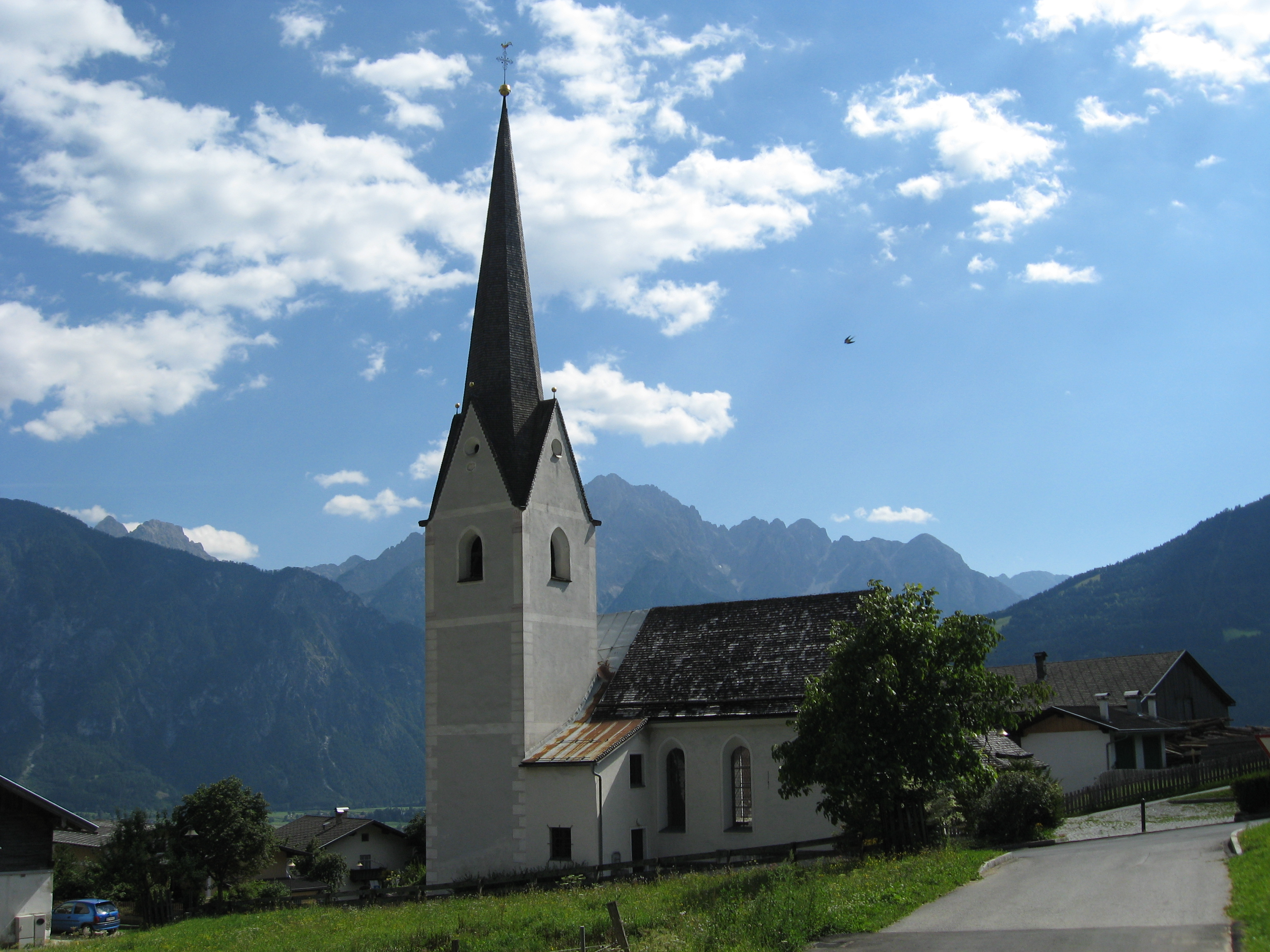 Chiesa di Thurn